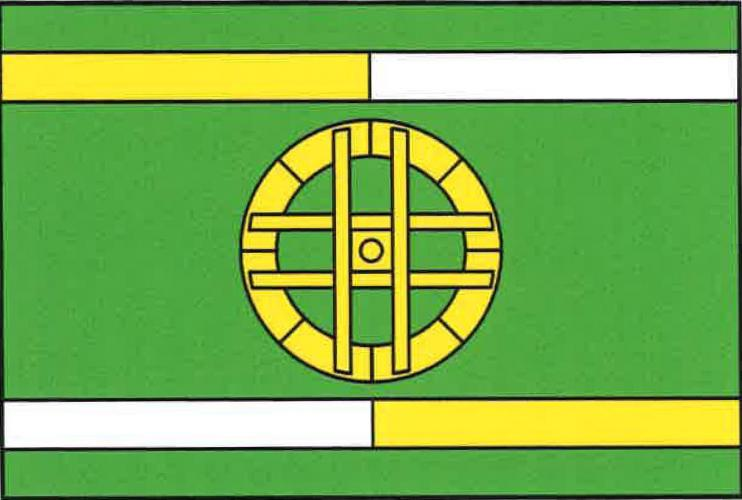 Všeradov vlajka